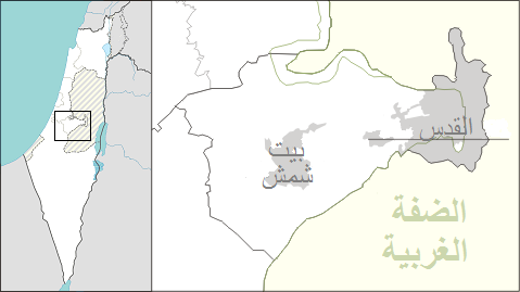 منطقة القدس واللطرون في الضفة الغربية، فلسطين